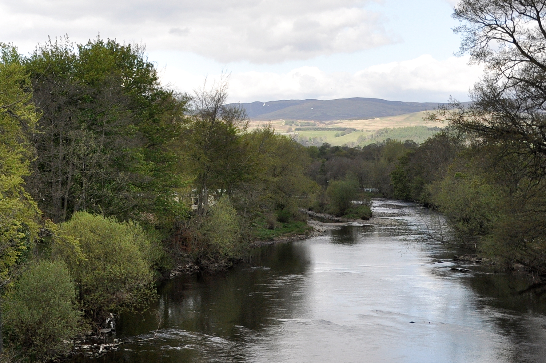 De Earn bij Crieff, Schotland